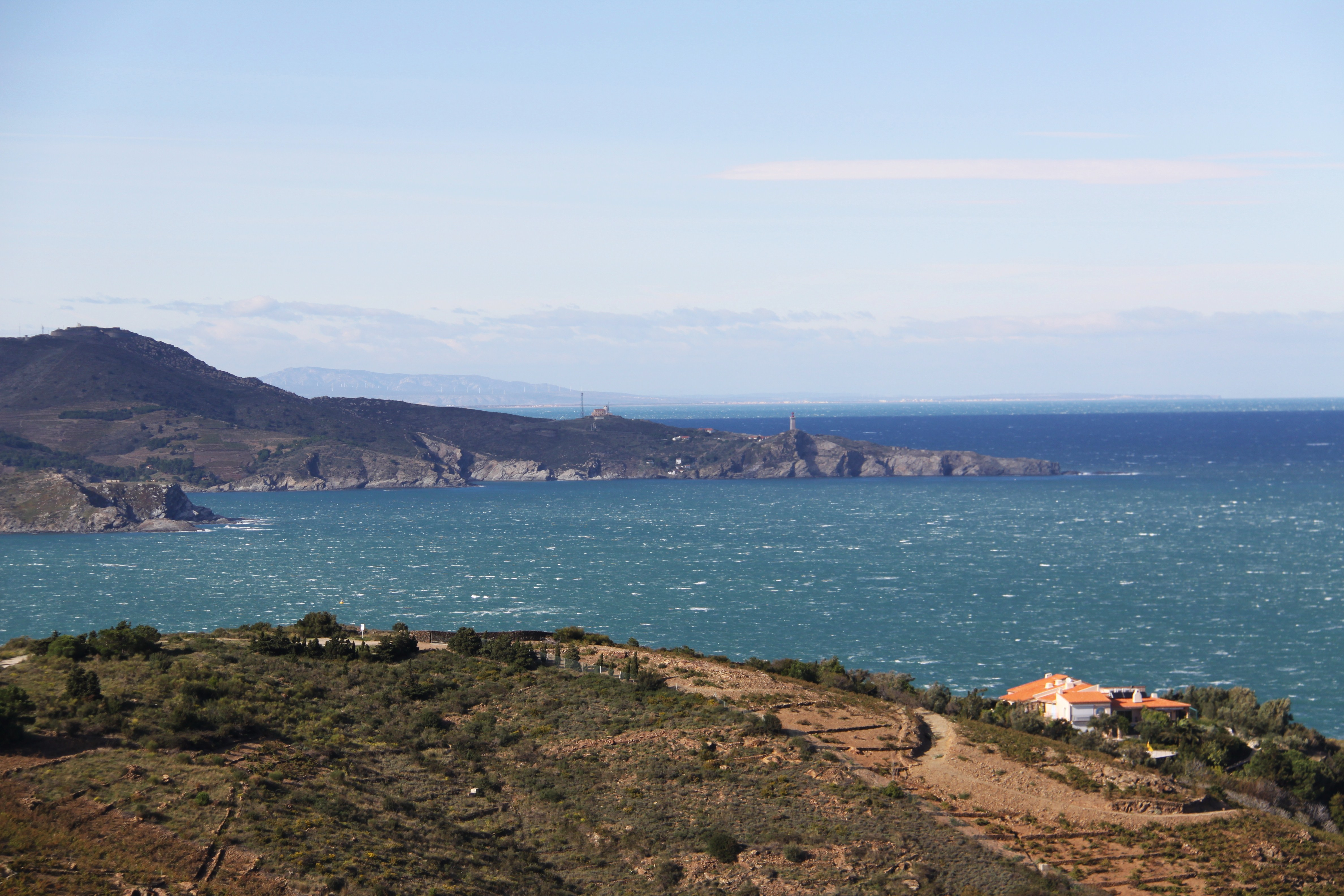 Etat de la mer Méditerranée au Cap Béar lors d' un vent de tramontane d' environ 100 km/h. Photographie prise depuis la route entre Banyuls-sur-Mer et Cerbère. Route entre Banyuls-sur-Mer et Cerbère, Pyrénées-Orientales, France